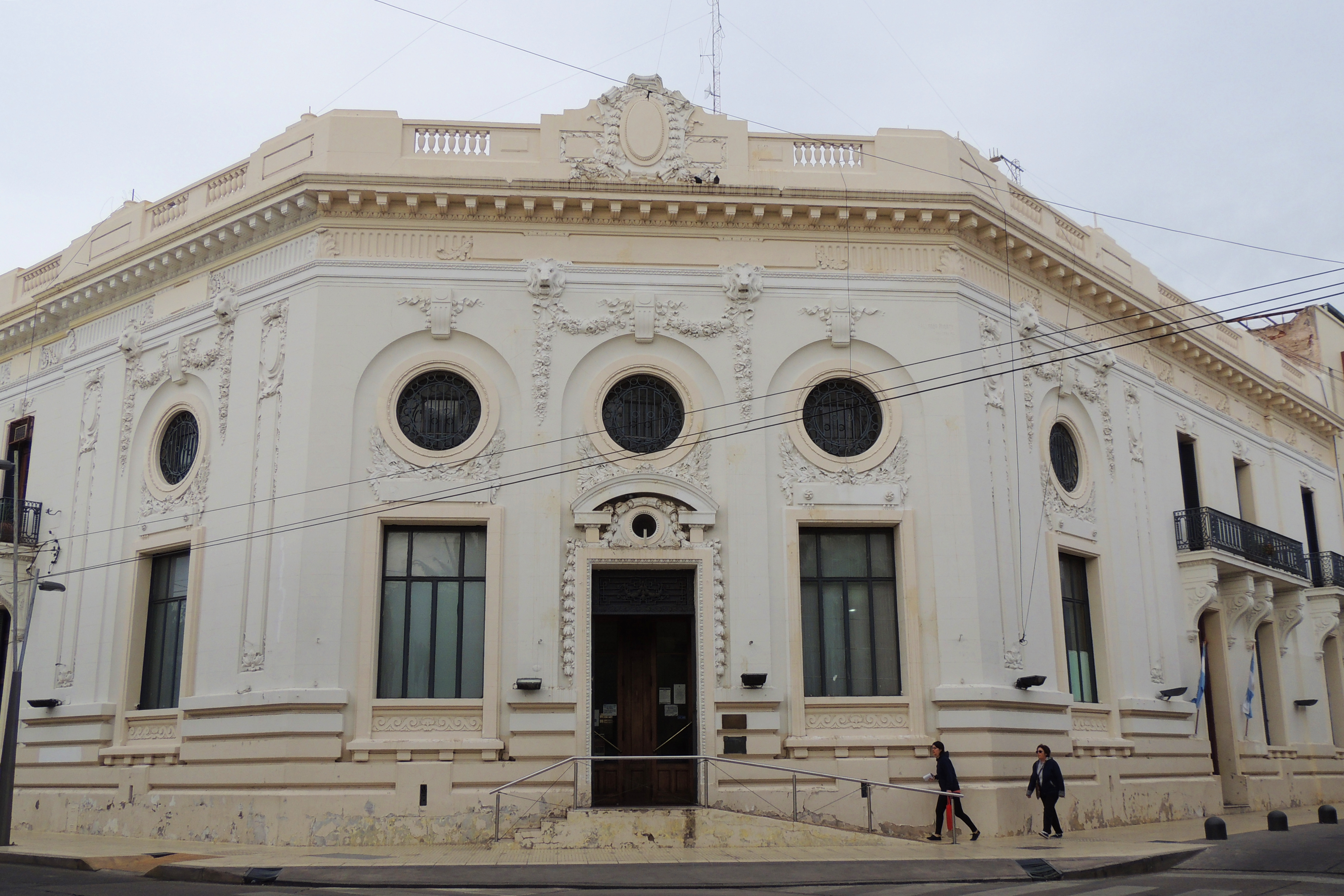 Ciudad de San Luis, Argentina